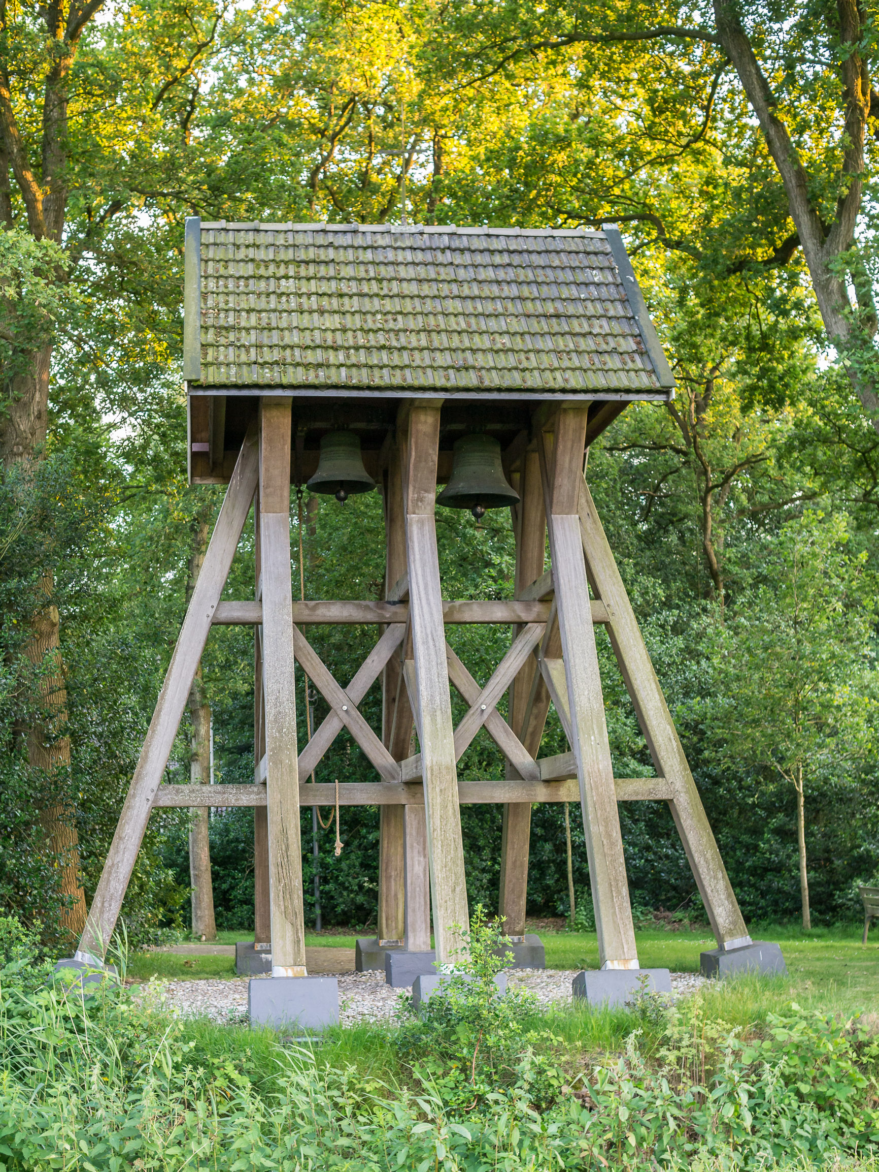 Dubbele klokkenstoel Thomaskerk, Katlijk